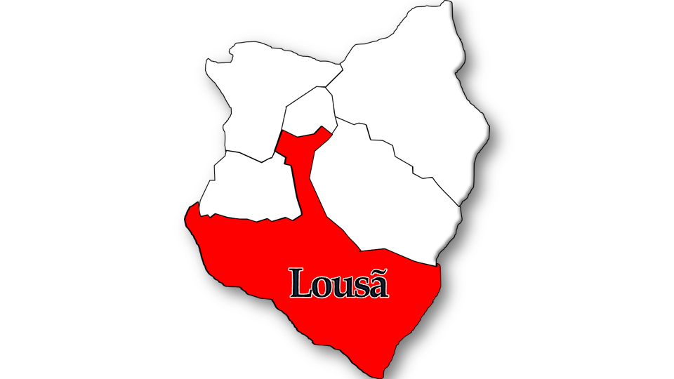 População